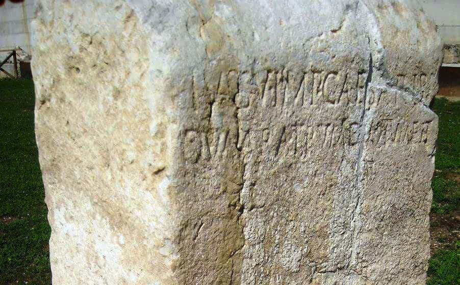 Cippo urbico con iscrizione in latino "Iussu imp(eratoris) Caesaris, qua aratrum ductum est" Questo termine (è stato fissato) dove l'aratro ha tracciato il solco, per ordine di Cesare imperator Santa Maria Capua Vetere - Anfiteatro Campano Queste pietre erano state piantate nel terreno, lungo la fossa che costeggiava le mura cittadine, verosimilmente con la parte iscritta rivolta verso la città, a segnare l'esistenza del sacro confine tra urbs e suburbium, ovvero tra la colonia romana ed il suo territorio. Il Caesar dell'iscrizione è stato identificato con il giovane Ottaviano. Datazione: 36 – 31 a.C.